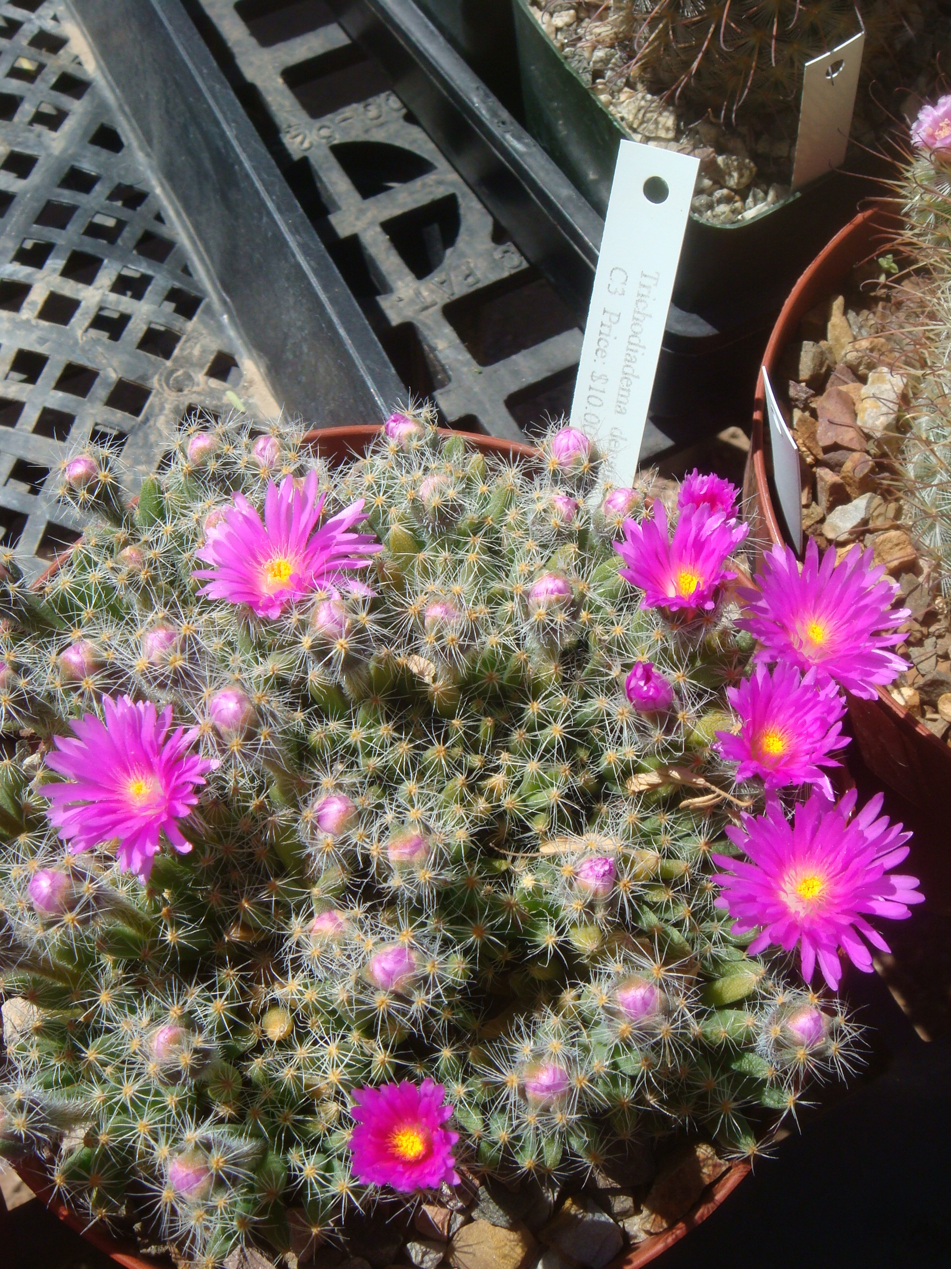 Trichodiadema densum, cultivated, Desert Botanical Garden, Phoenix, Arizona